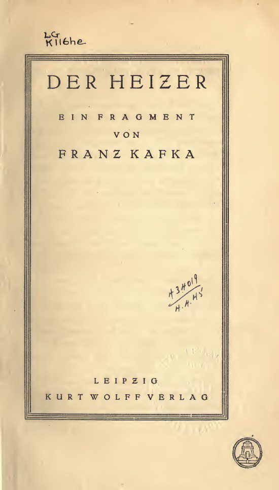 Der Heizer : ein Fragment / von Franz Kafka. - Leipzig : Kurt Wolff, 1913. - 46 p. ; 22 cm.